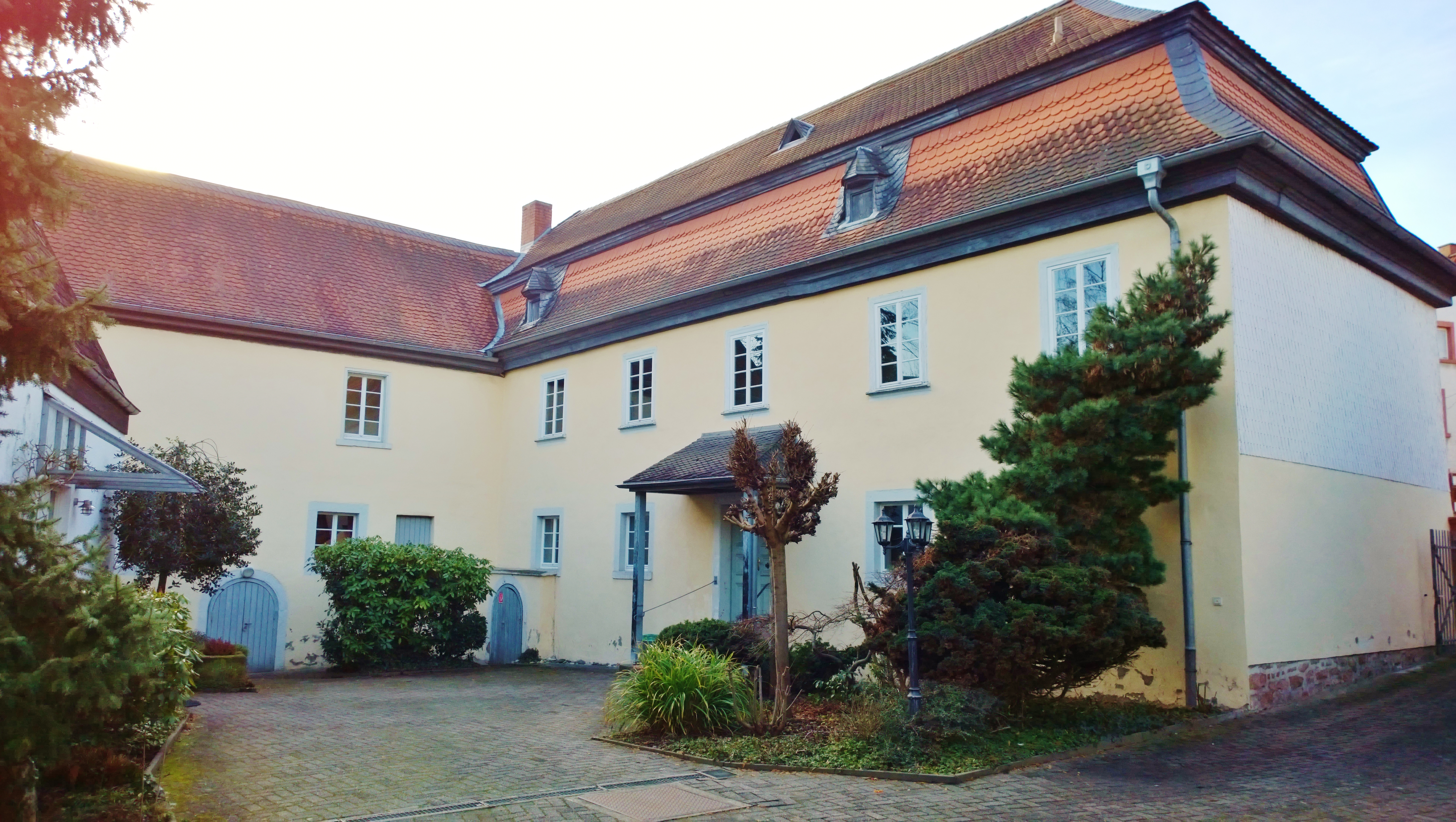 Jagdschlösschen Carlsruhe: Innenhof - Blick West; Eingänge Gewölbekeller